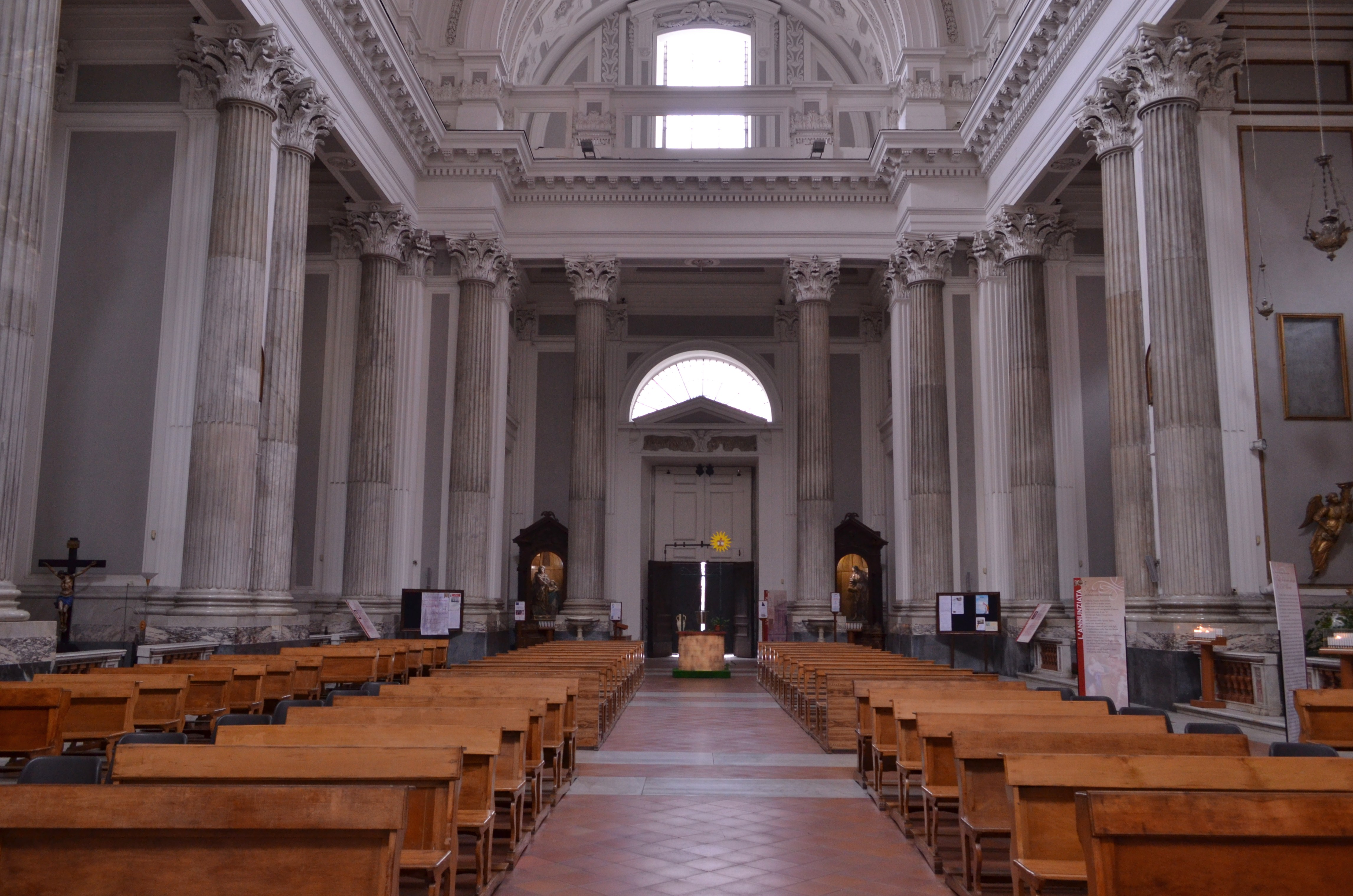 Controfacciata